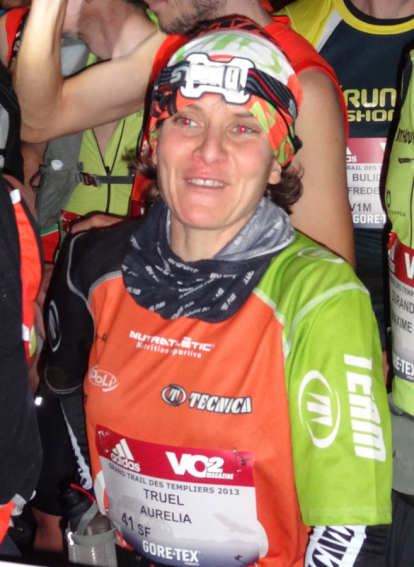 Aurélie TRUEL avant le départ du Trail des Templiers 2013